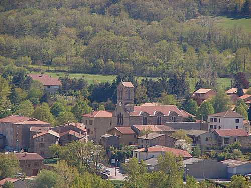 Vue du village de Roisey